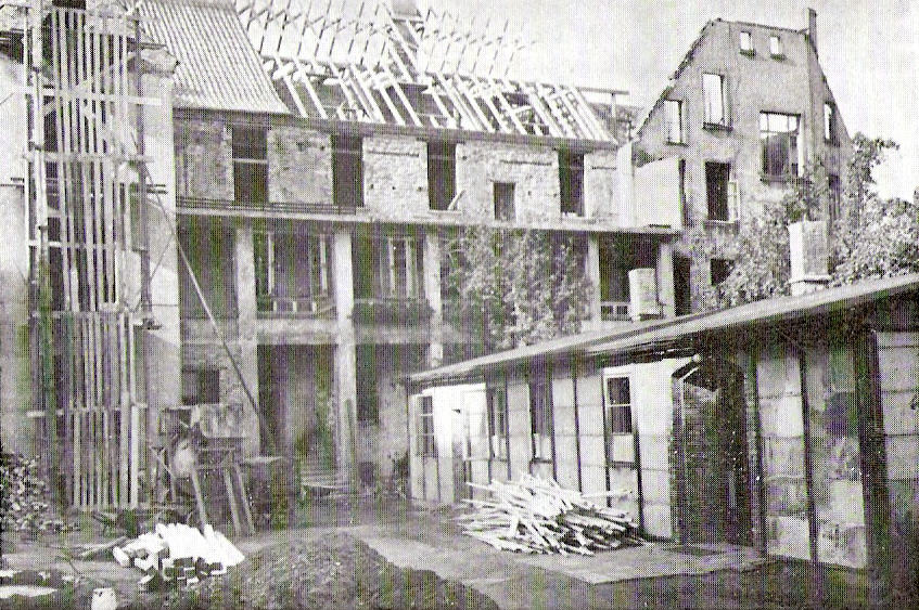 St. Johann Osnabrück 1946 - Hofsete mit Baracke